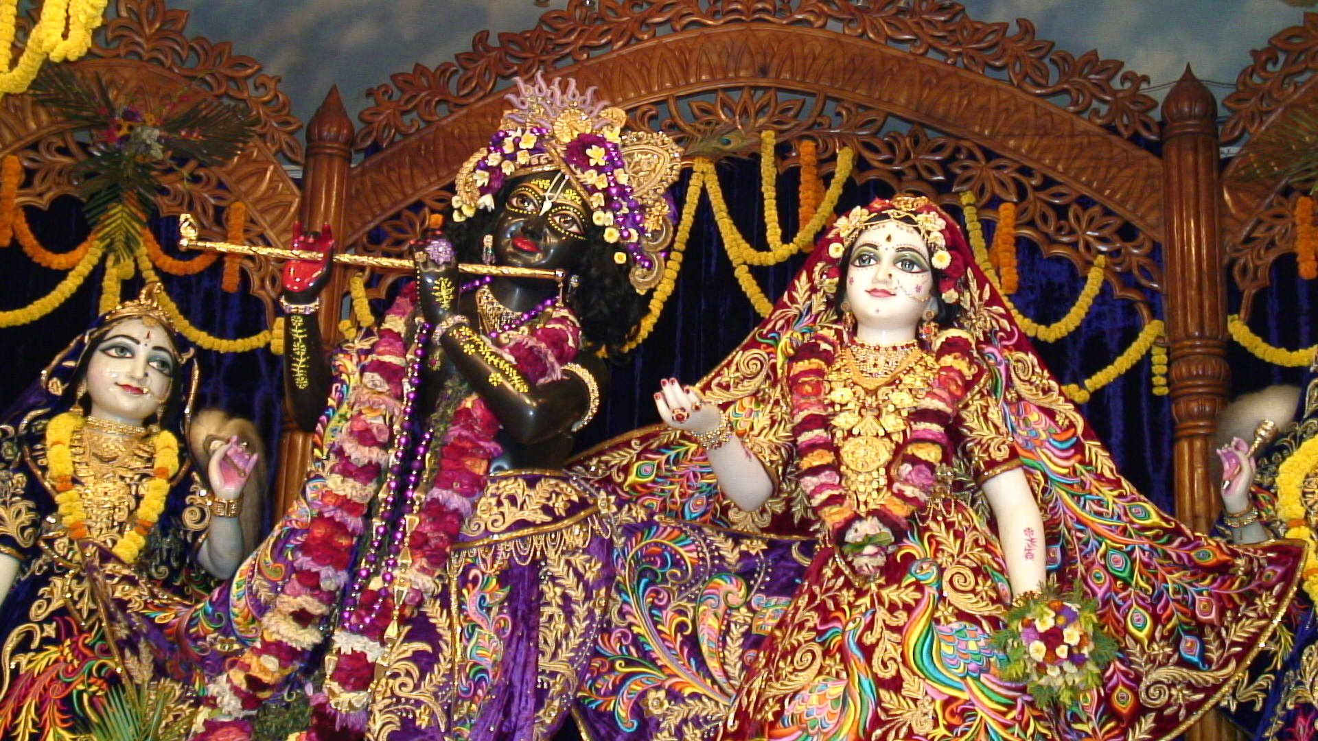 Radha_Krishna_ISKCON_Mayapur